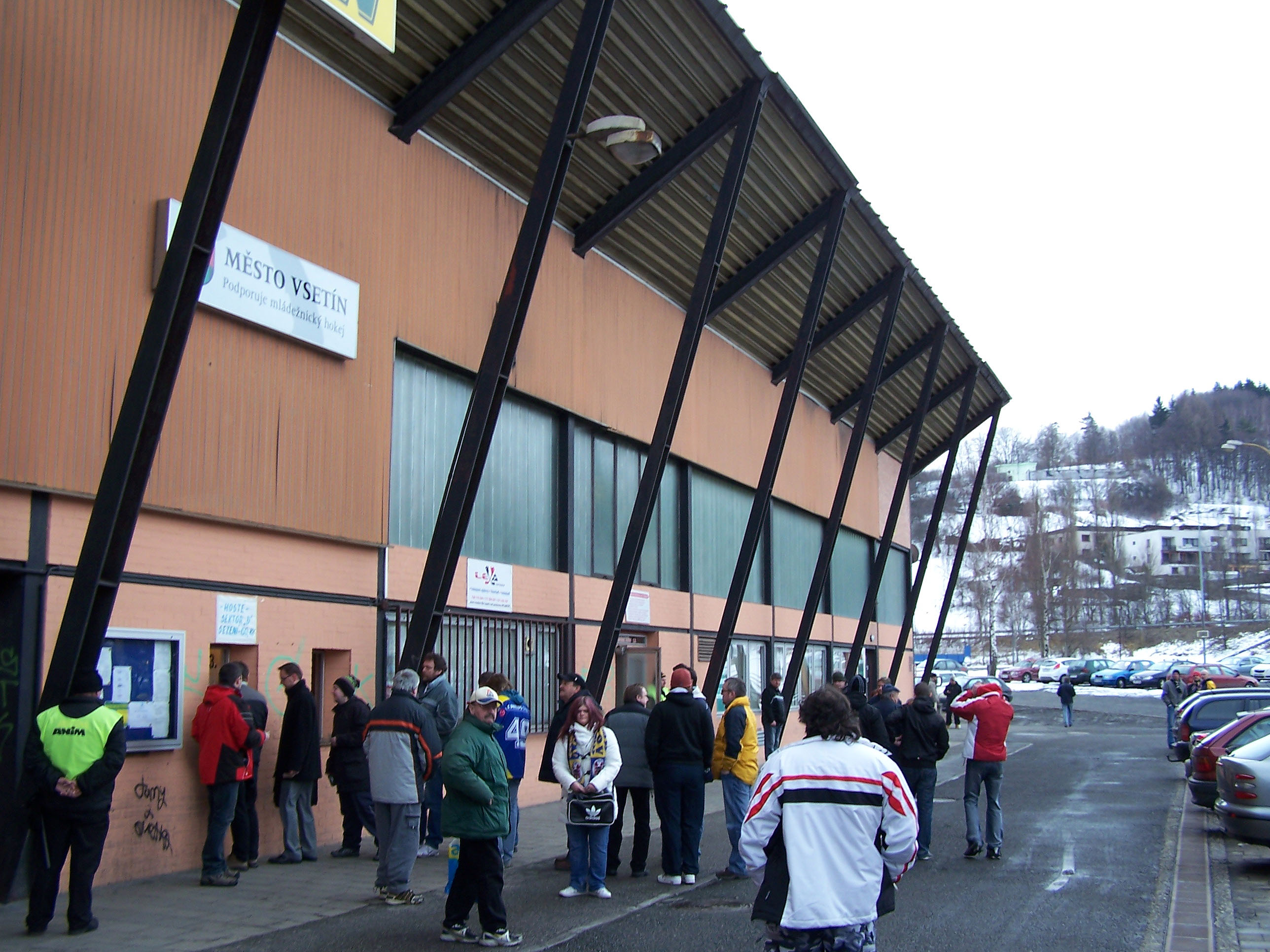 Zimní stadion Na Lapači, home arena of VHK Vsetín in Vsetín, Czech Republic